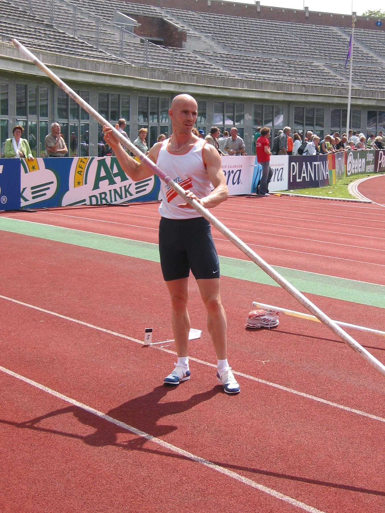 Dutch Championships 2007, Amsterdam, Pole Vault, Laurens Looije